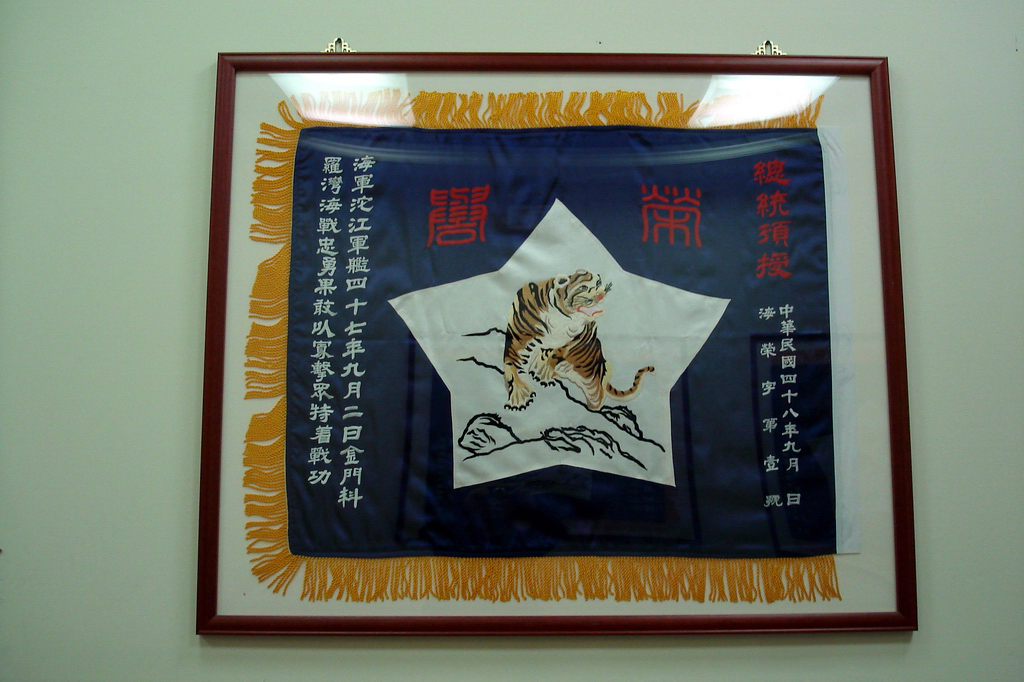 國軍歷史文物館展示中華民國海軍沱江艦在九二海戰後獲總統頒授之榮譽虎旗。